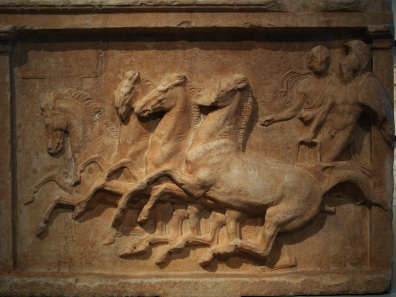 Koadriga